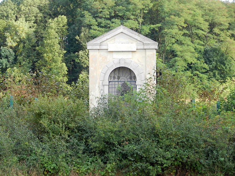 Gedächtniskapelle anlässlich des Reitunfalles von Johann Ernst Hoyos-Sprinzenstein am 23. Oktober 1849.